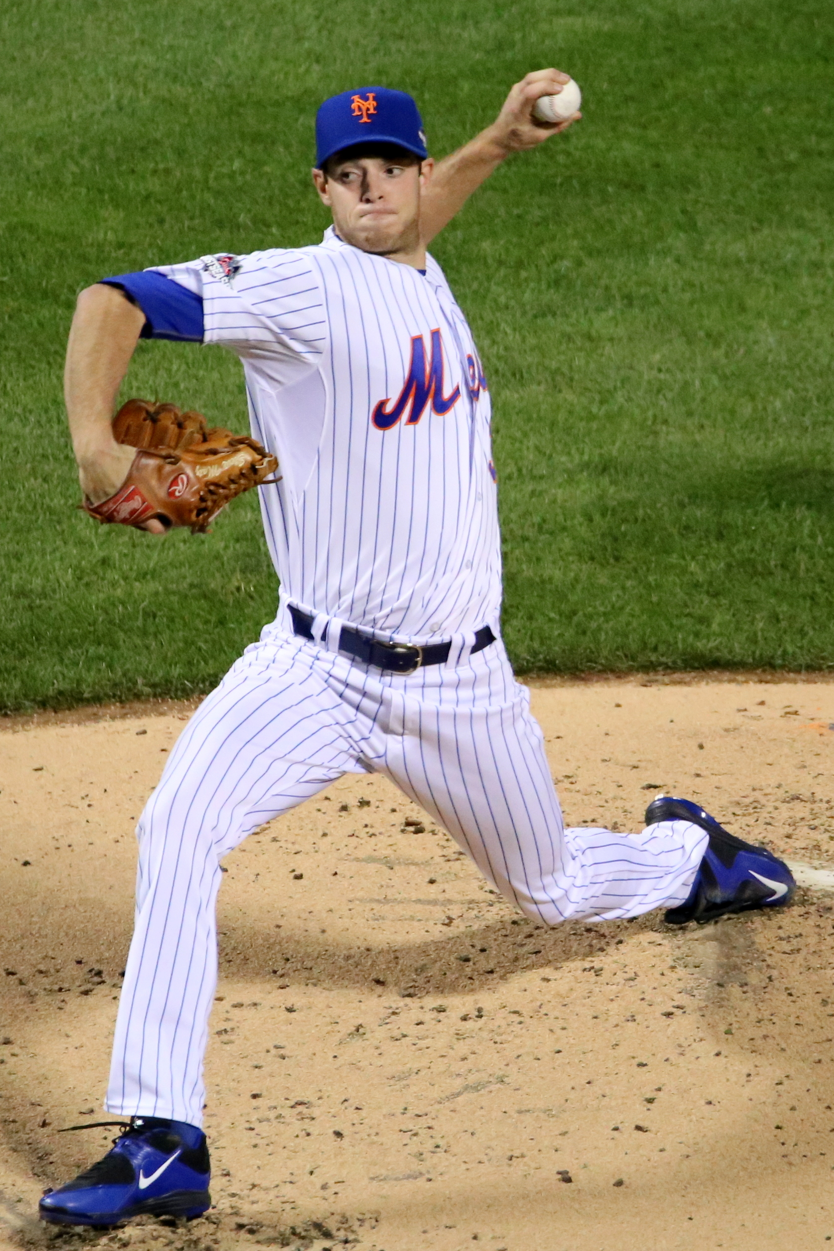 Steven Matz